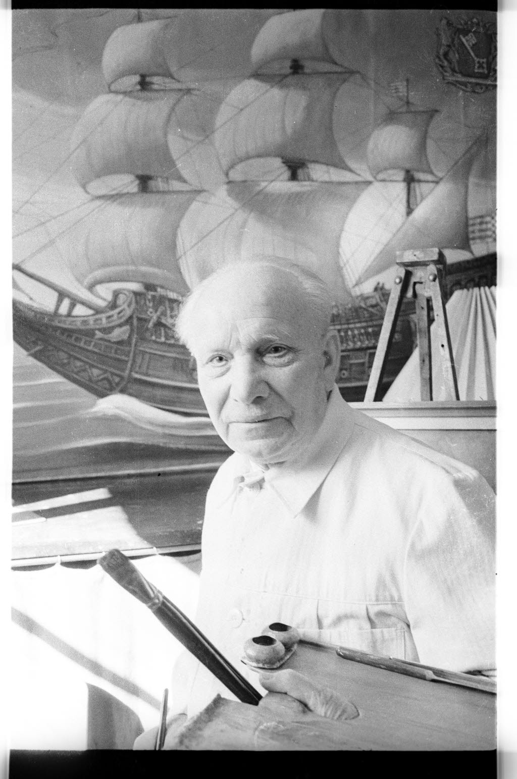 Maler Friedrich Mißfeldt